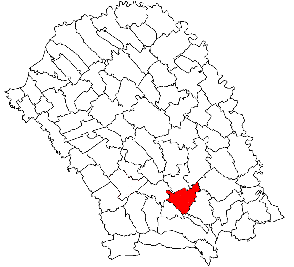 Categorie:Hărţi ale judeţului Botoşani